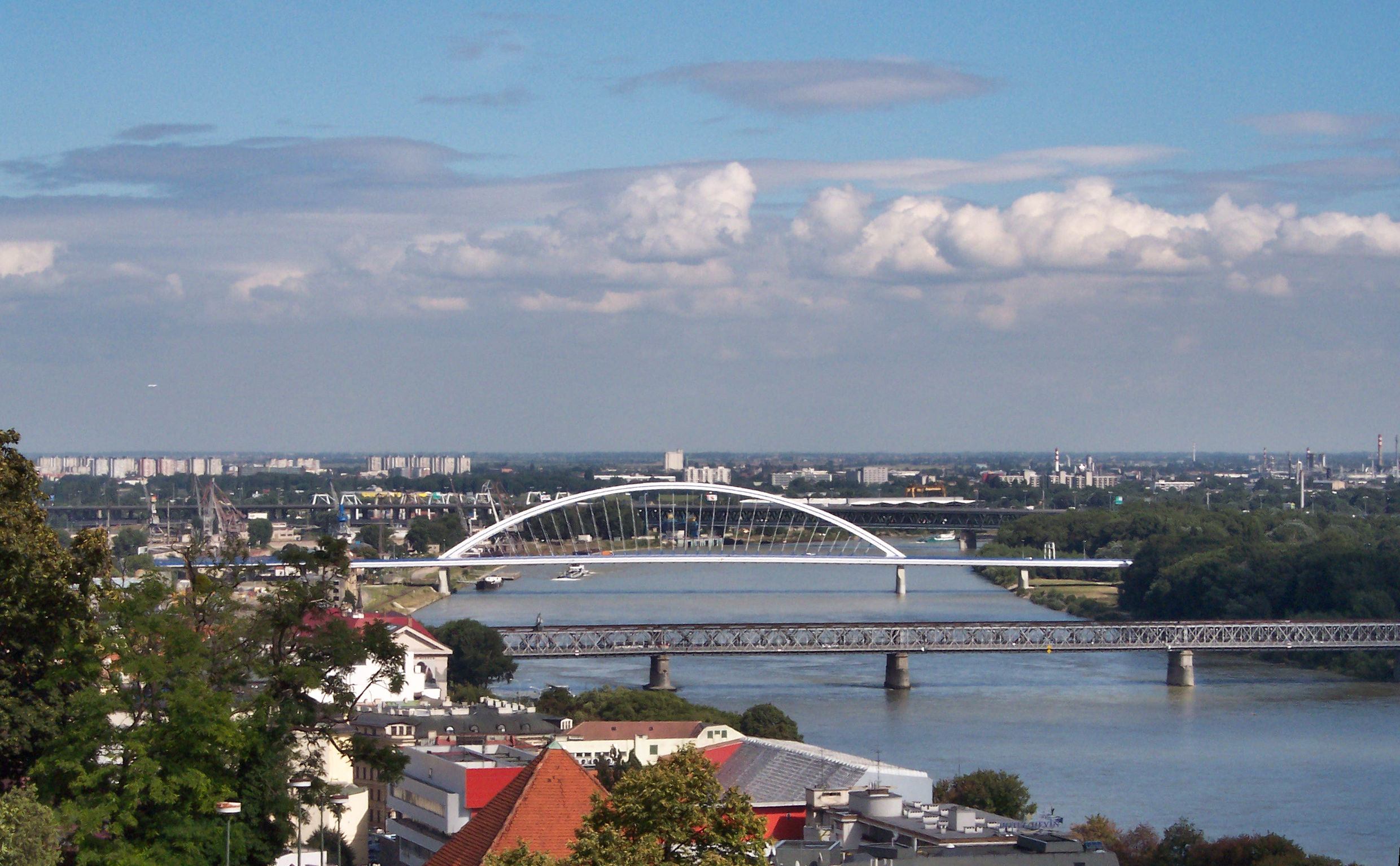 Drei Brücken in Bratislava